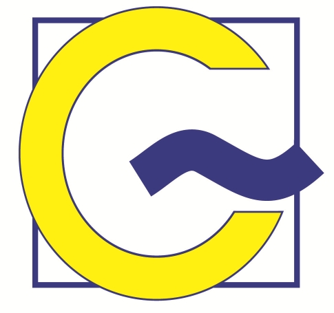 Stadtmarketinglogo der Stadt Greven